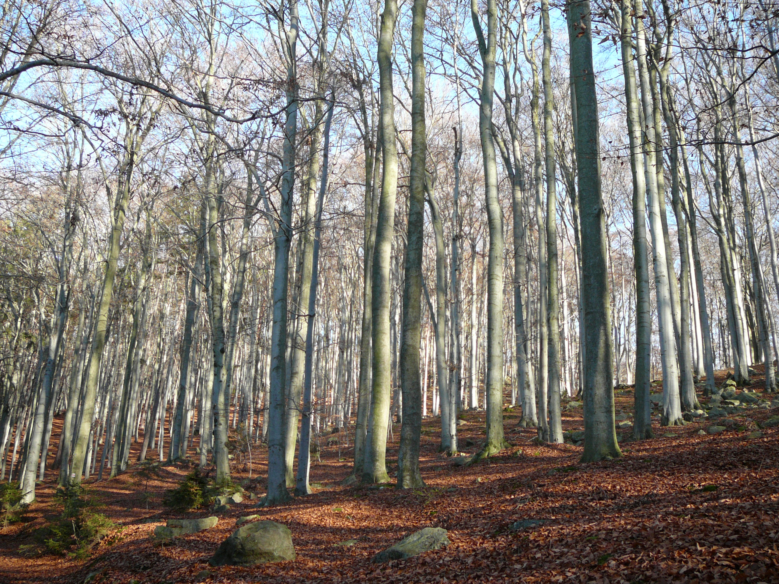 Acidofilní biková bučina v Přírodní rezervaci Velký Blaník